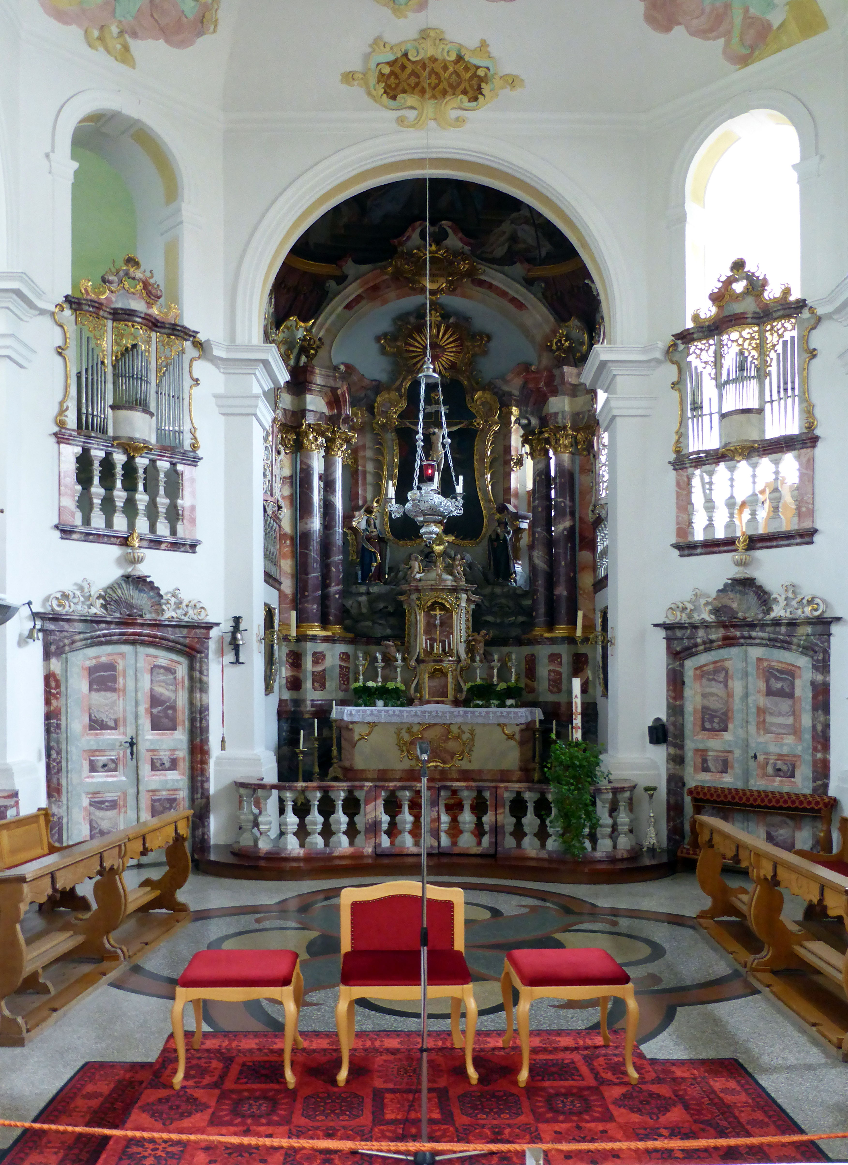 Wikipedia:Süddeutschland-Treffen im Mai 2016 in Kempten (Allgäu). Kloster Heiligkreuz - Hochaltar.